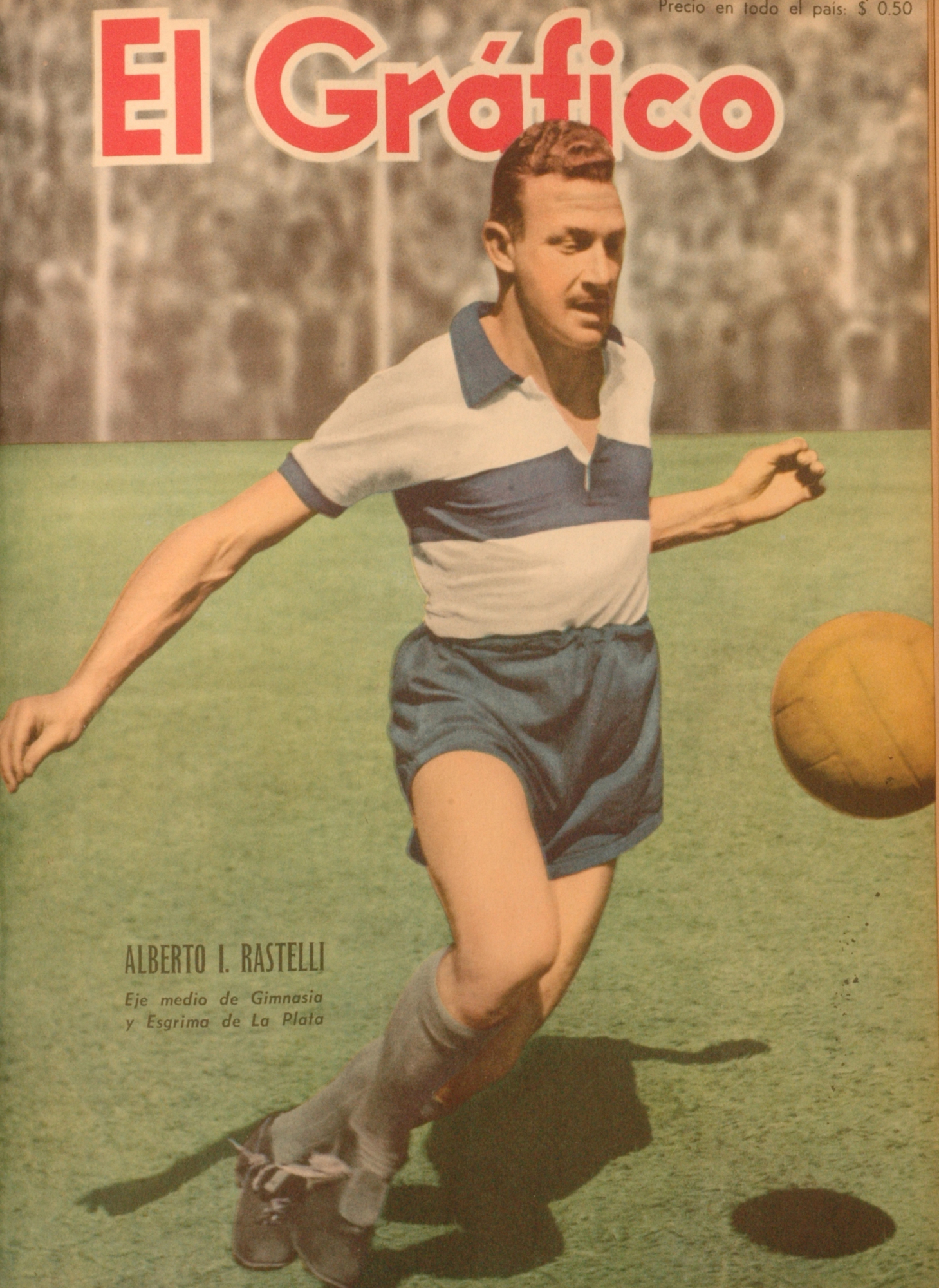 El Grafico del 17 de Junio de 1949. Edicion 1558